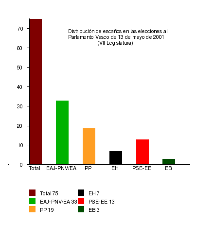 Resultados de las elecciones al Parlamento Vasco (España) de 2001. A partir de un